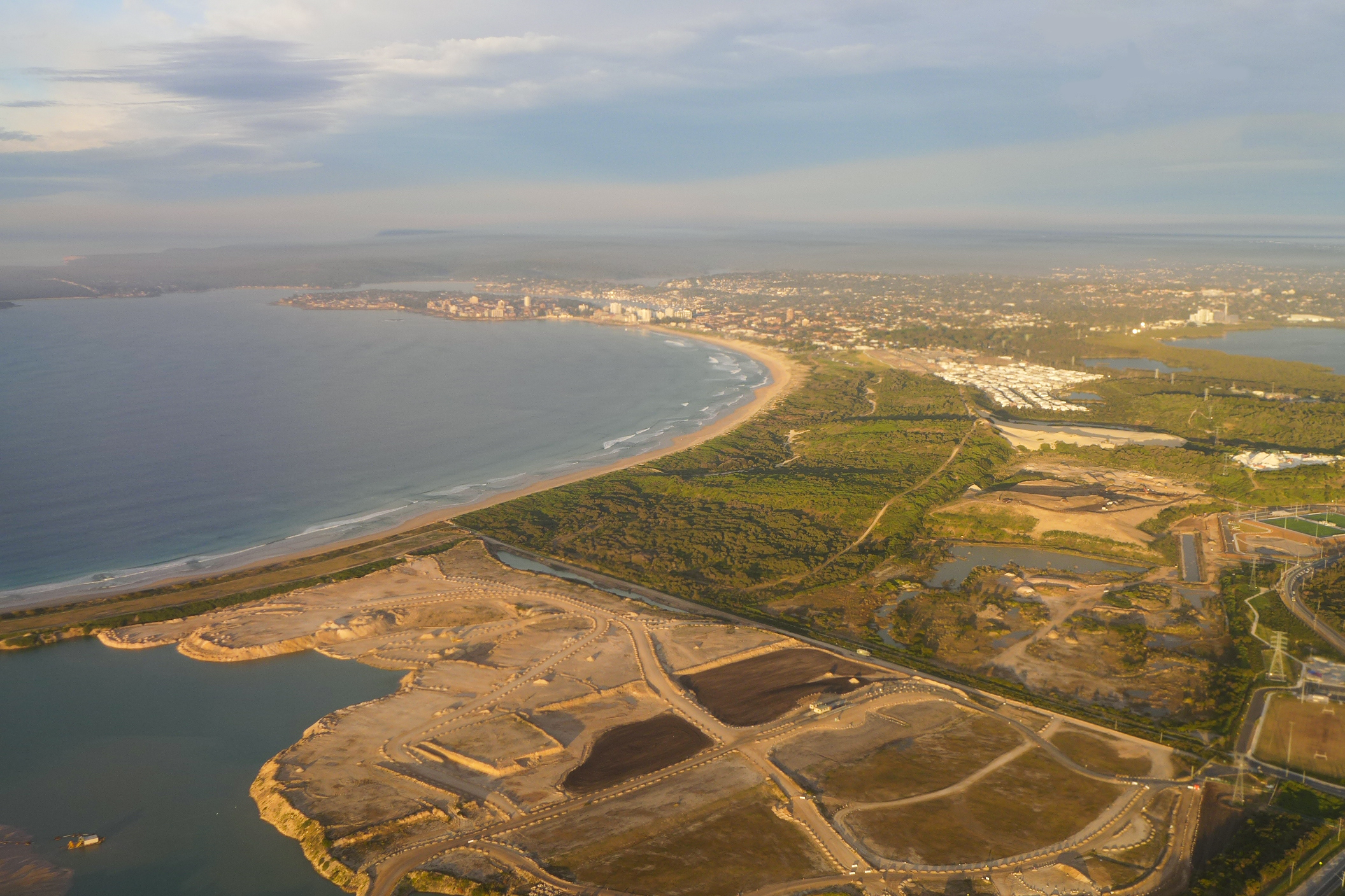 Cronulla NSW